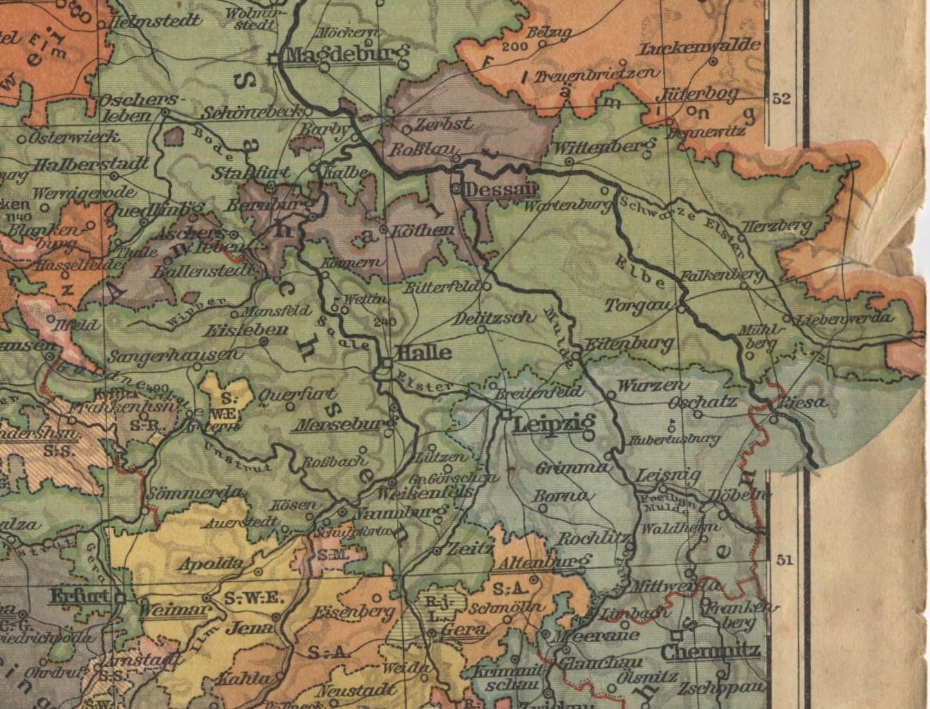 Der Regierungabezirk Mersburg (grün)